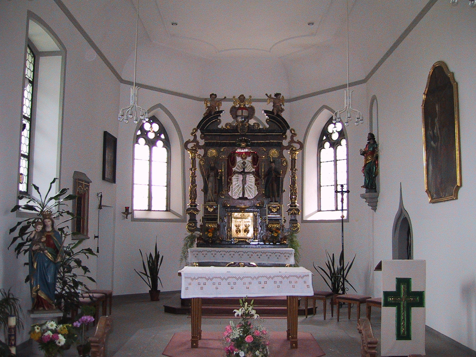 Innenaufnahme der Kapelle Bernrain in Emmishofen, einem Ortsteil in Kreuzlingen, Kt. TG, Schweiz.